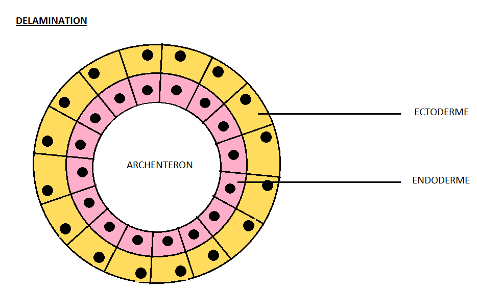 ceci est le schéma d'un type de gastrulation.